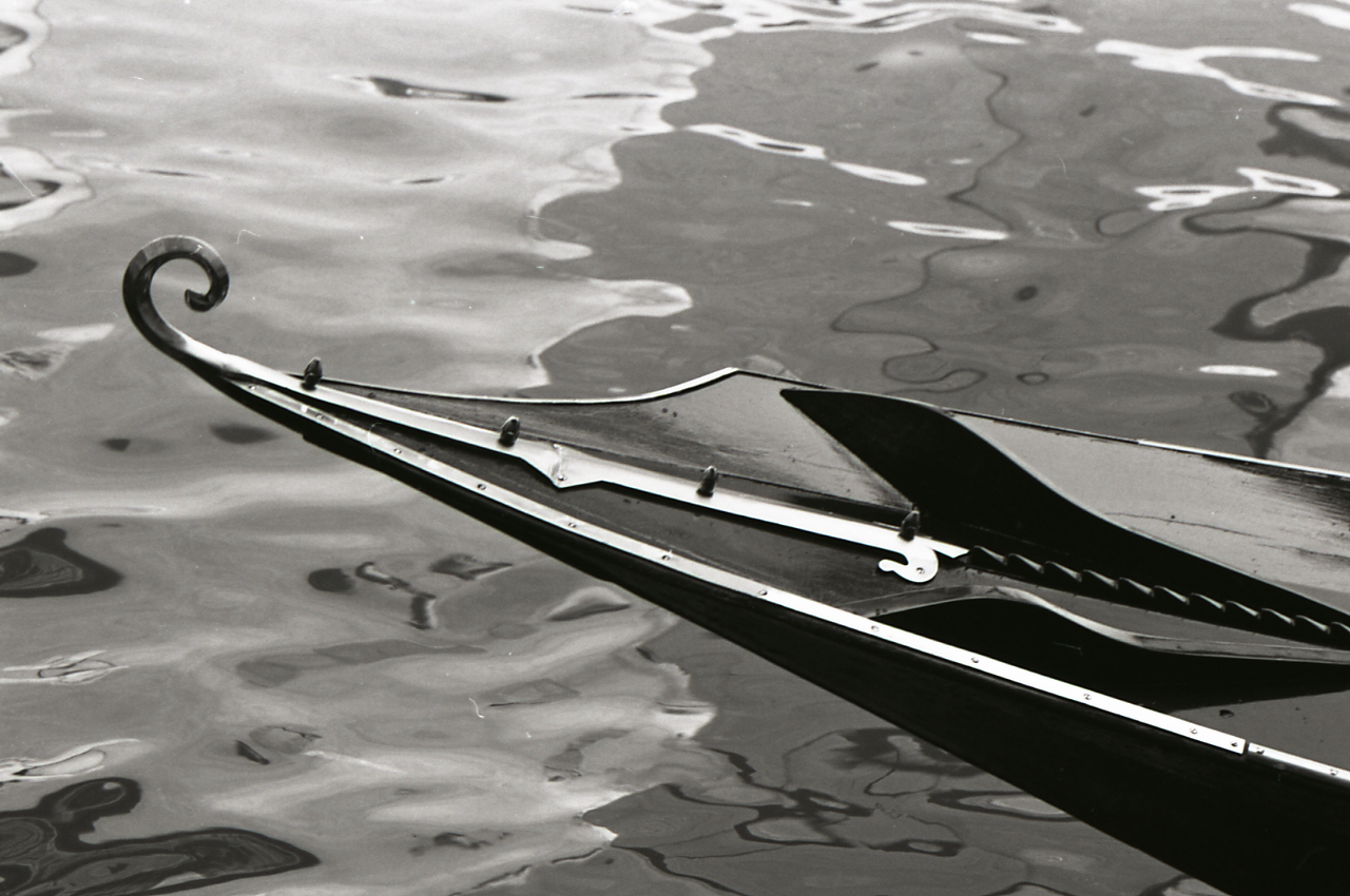 Serie fotografica : Venezia, 1969 / Paolo Monti. - Strisce: 7, Fotogrammi complessivi: 38 : Negativo b/n, gelatina bromuro d'argento/ pellicola ; 35 mm. - ((I fotogrammi hanno una doppia numerazione. . - Sul portanegativi: Nikon FP4. - Sul dorso del portanegativi Monti specifica: "Riflessi" e all'interno elenca alcuni soggetti. - Fonte: Agenda di Paolo Monti: Monti - Agenda 1969 (1969), presso Archivio Paolo Monti